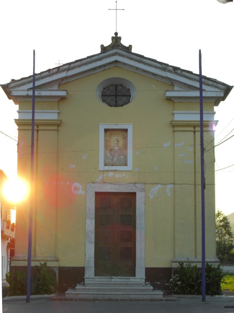 Chiesa di S. Sisto fuori le Mura - Alife